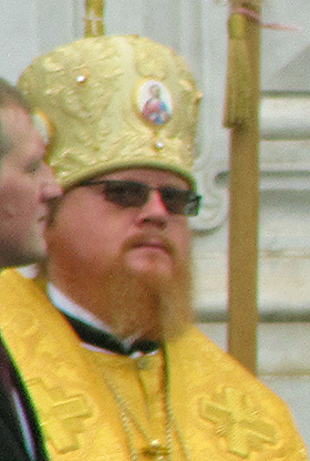 Епископ Тихон (Зайцев) во время праздничной службы в честь 200-летия Отечественной войны 1812 года возле Храма Христа Спасителя. 9 сентября 2012 года